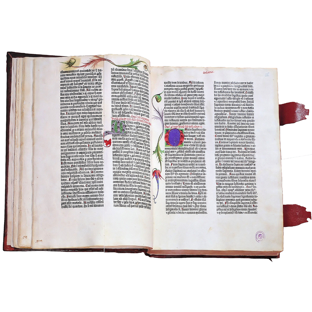 Biblia Gutenberg o de 42 líneas. Maguncia, 1454. Facsímil de la Biblia de Gutenberg de Burgos. Editada por Vicent García Editores. Primer libro impreso en el mundo con tipos móviles.